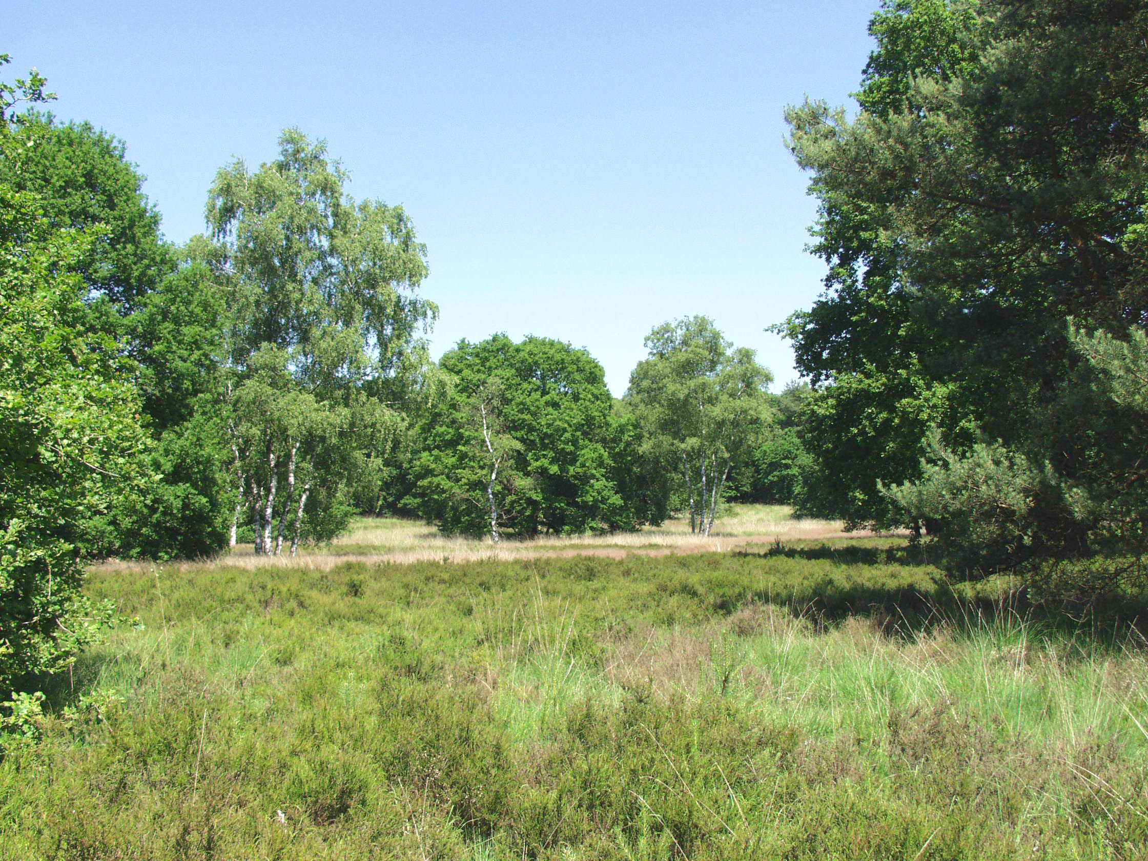 Heidelandschaft im Meinweg-Nationalpark (NL)